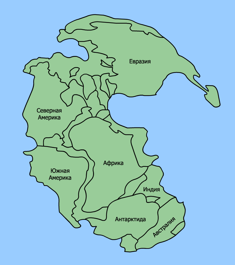 Пангея